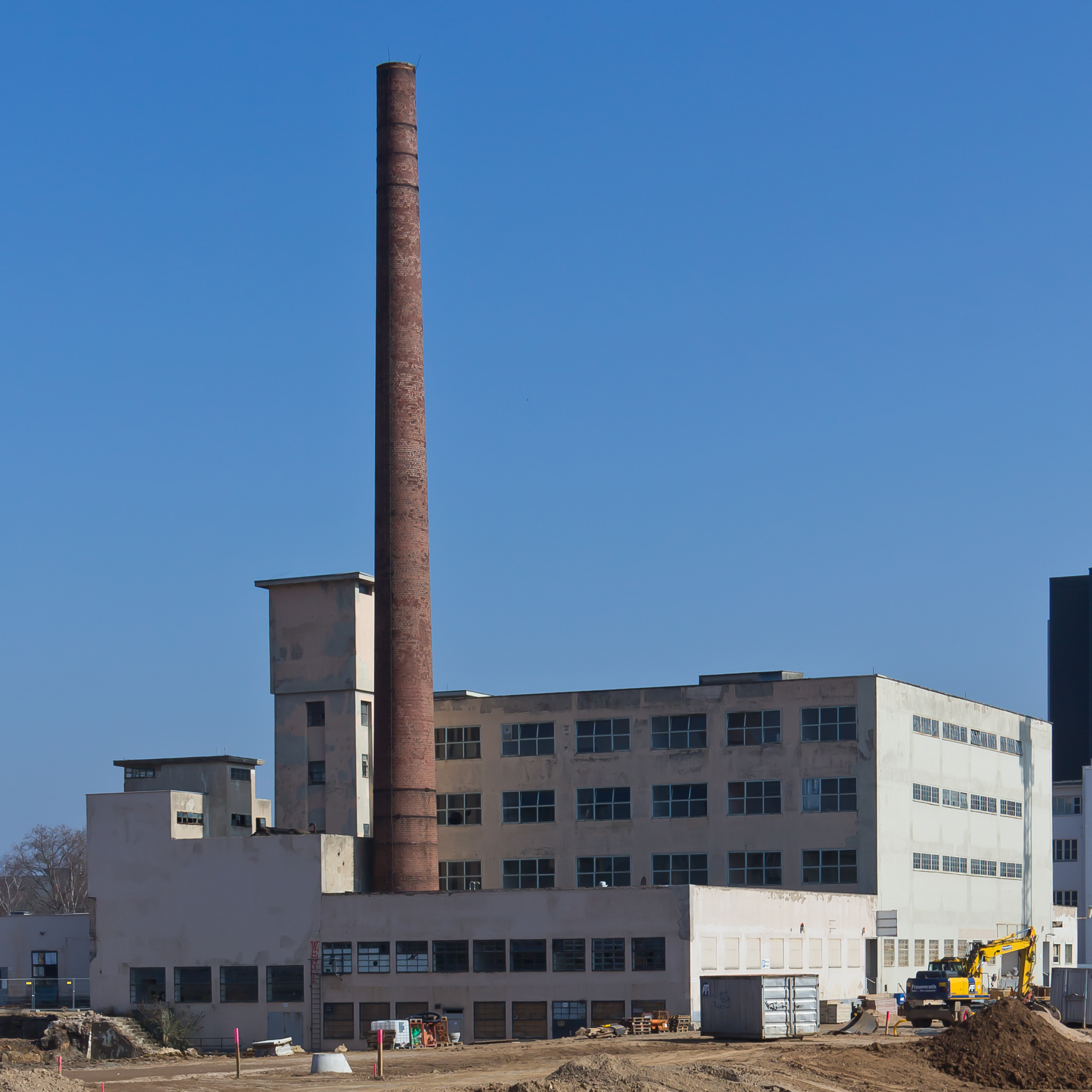 Denkmalgeschütztes Fabrikgebäude der Sidol-Werke Siegel & Co mit Schornstein. Architekt: Otto Müller-Jena. Baujahr: 1926-28